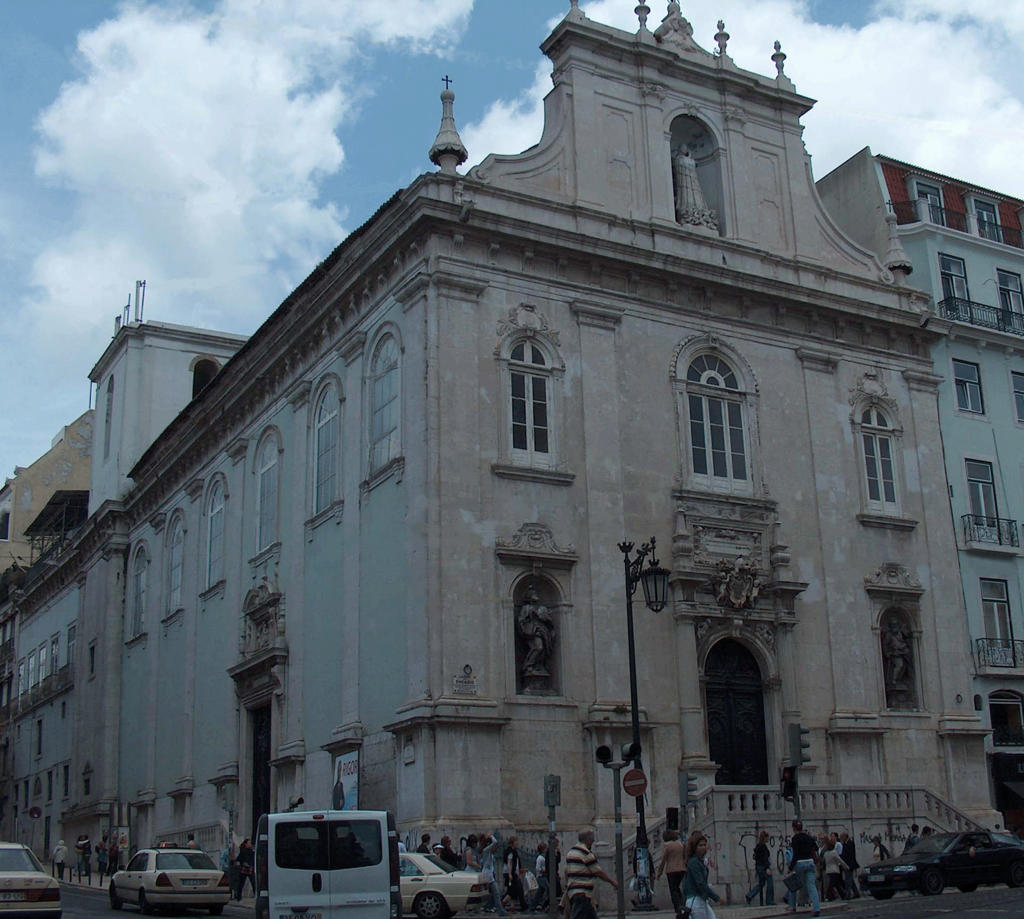 Igreja do Loreto em Lisboa